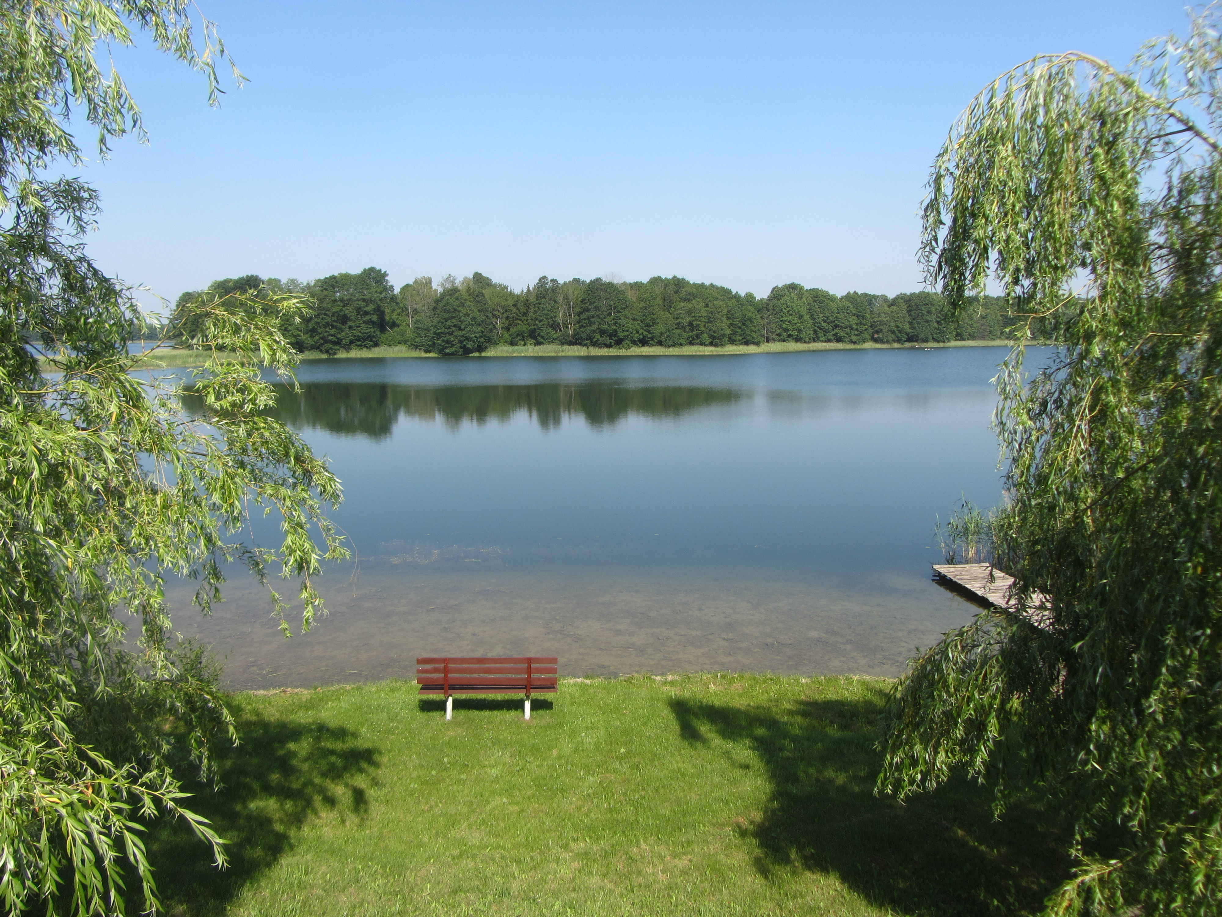 Buteliūnai, Lithuania